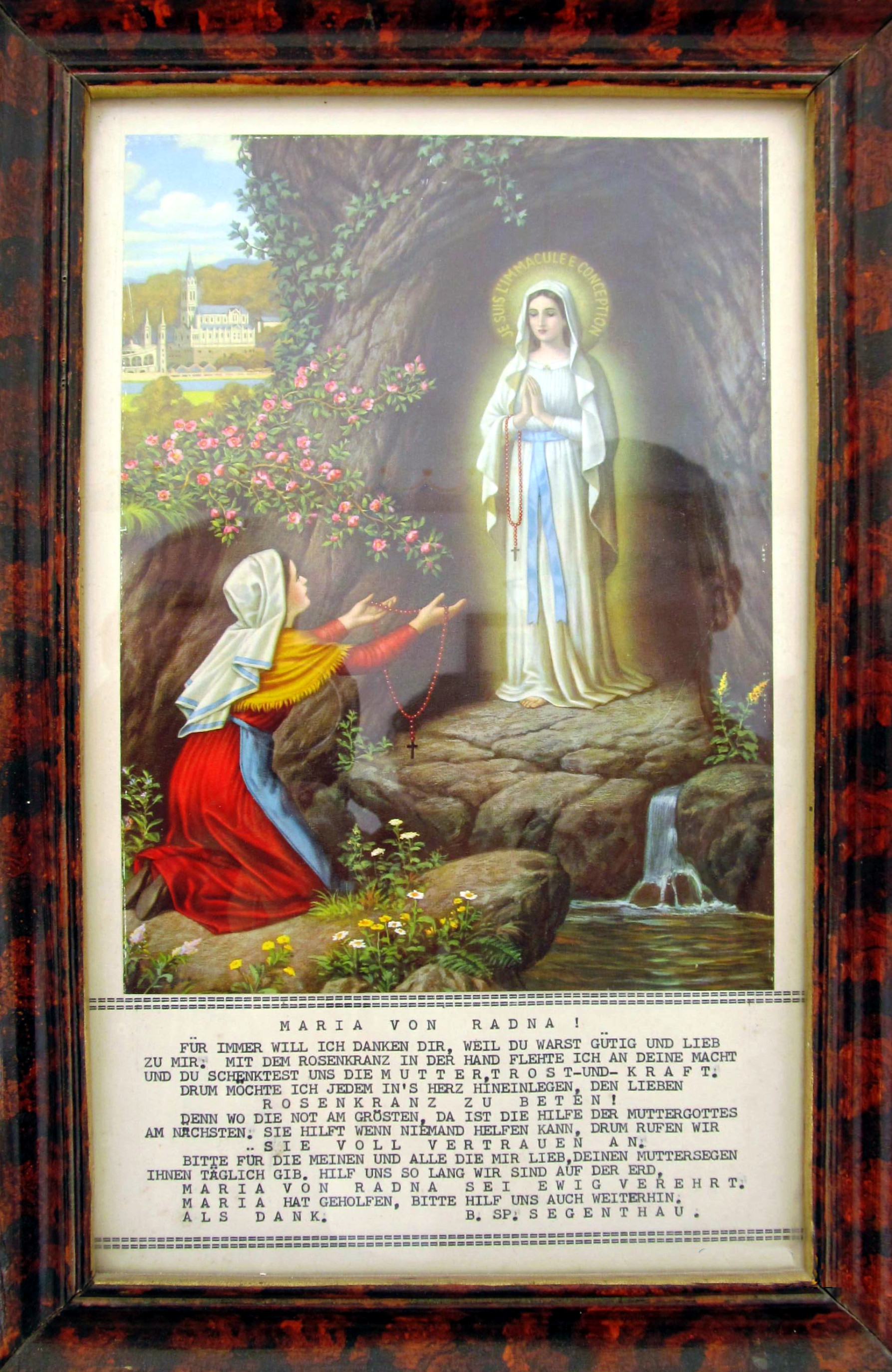 Bild in der Bildergalerie der Wallfahrtsbasilika Maria Radna in Lipova, Rumänien.